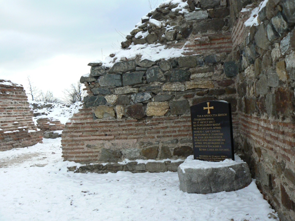 Входът на крепостта Траянови врата край Костенец. The entrance of the Fortress "Trayanovi vrata" (Trayan gates) near Kostenetz, Bulgaria.